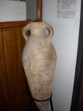 Amphore à vin dite d'Aqaba (Aila antique), importation romaine de la période axoumite retrouvée près d'Asmara, Érythrée - Musée national d'Addis Abeba, Éthiopie A Roman "Ayla-Aksum" wine amphora, produced in Aila (modern Aqaba), Roman import found at Asmara, Erythrea--Addis Ababa National Museum, Ethiopia.